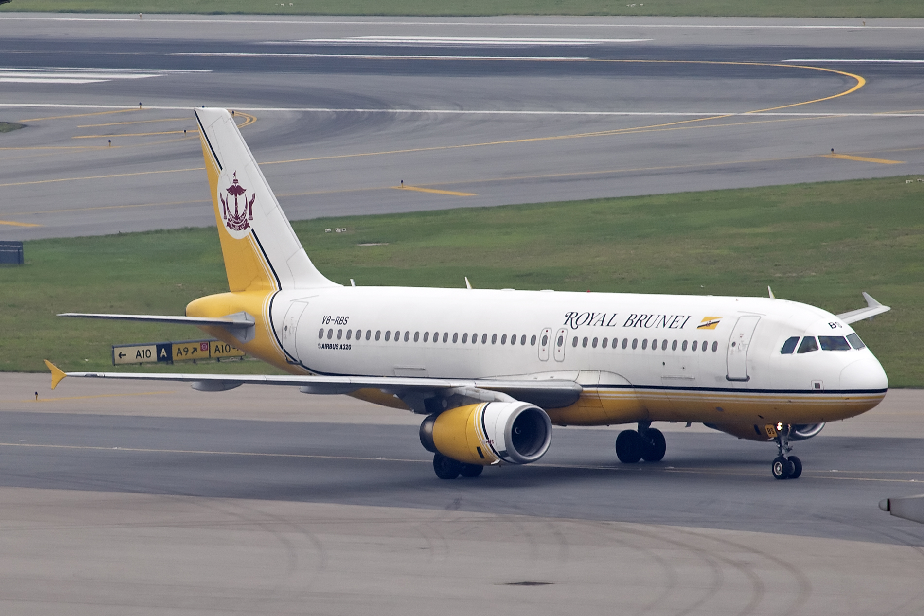 Hong Kong